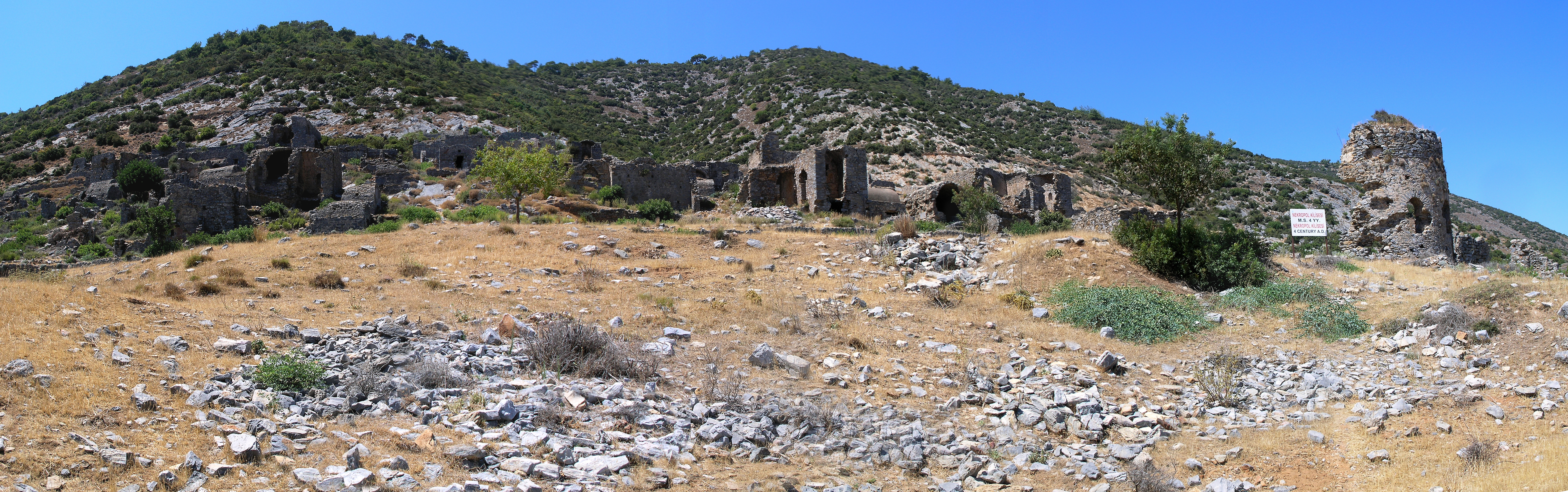 Турция, Анамур – Анемуриум